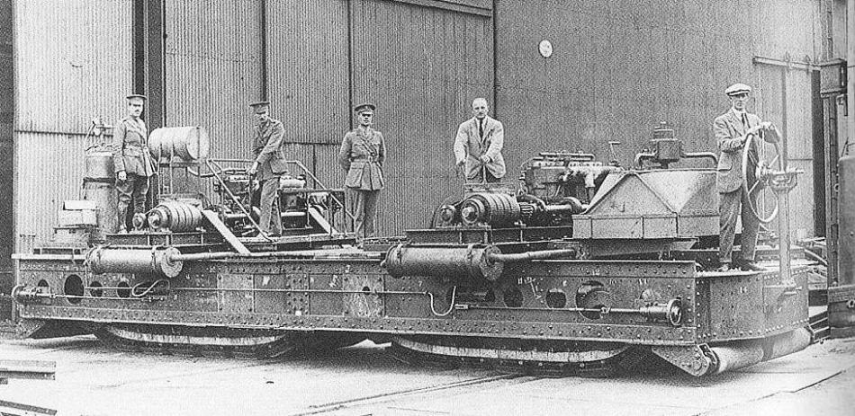 Digitale reproductie foto van de Pedrail Landship.